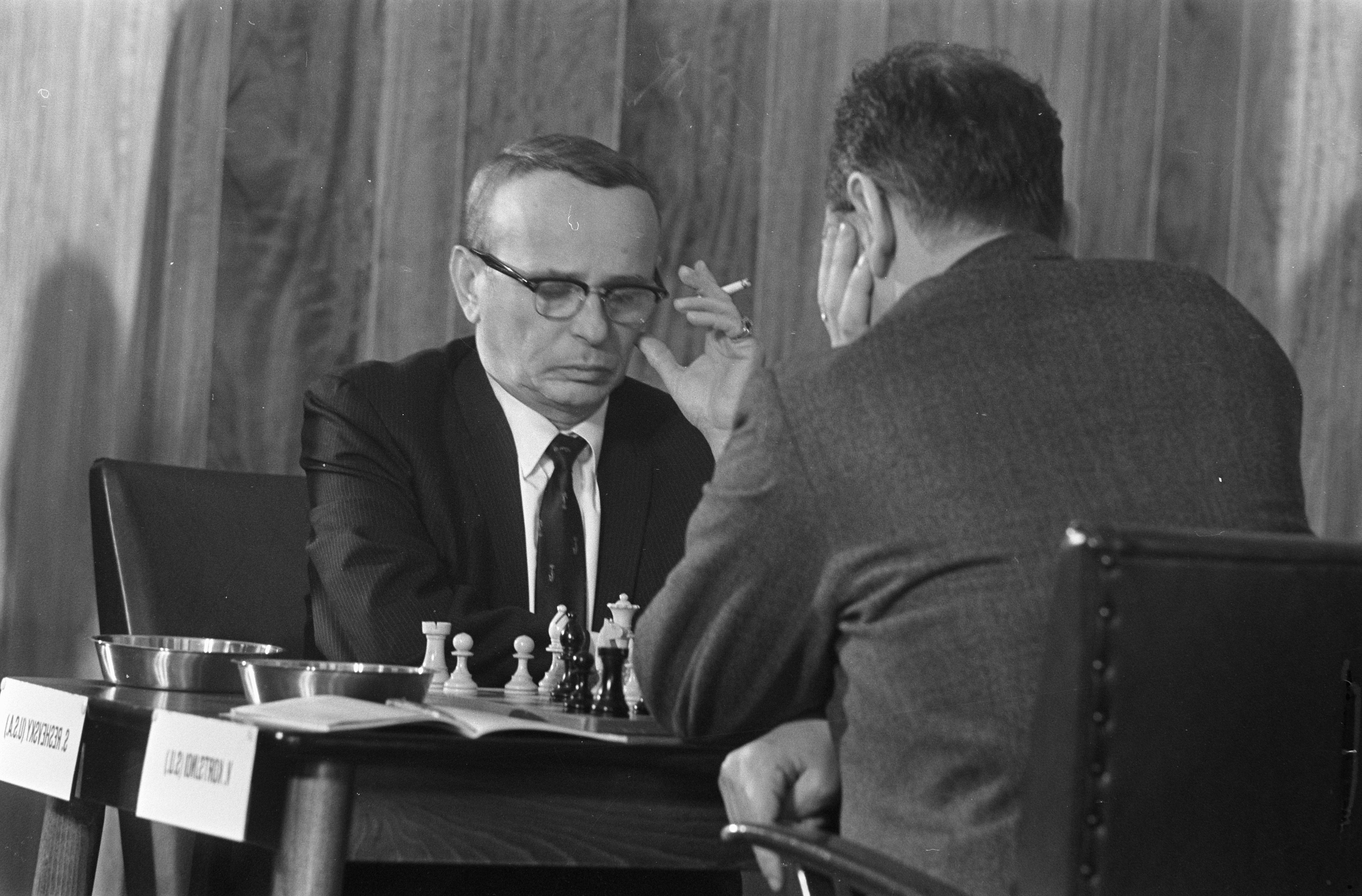 Collectie / Archief : Fotocollectie Anefo Reportage / Serie : [ onbekend ] Beschrijving : Kandidaten toernooi Kortsjnoi tegen Reskevsky. Reskevesky tijdens wedstrijd (USA) Datum : 8 mei 1968 Trefwoorden : kandidaten, schaken, toernooien Persoonsnaam : Kortsjnoi, Viktor, Reshevsky, Samuel Fotograaf : Kroon, Ron / Anefo Auteursrechthebbende : Nationaal Archief Materiaalsoort : Negatief (zwart/wit) Nummer archiefinventaris : bekijk toegang 2.24.01.05 Bestanddeelnummer : 921-3312